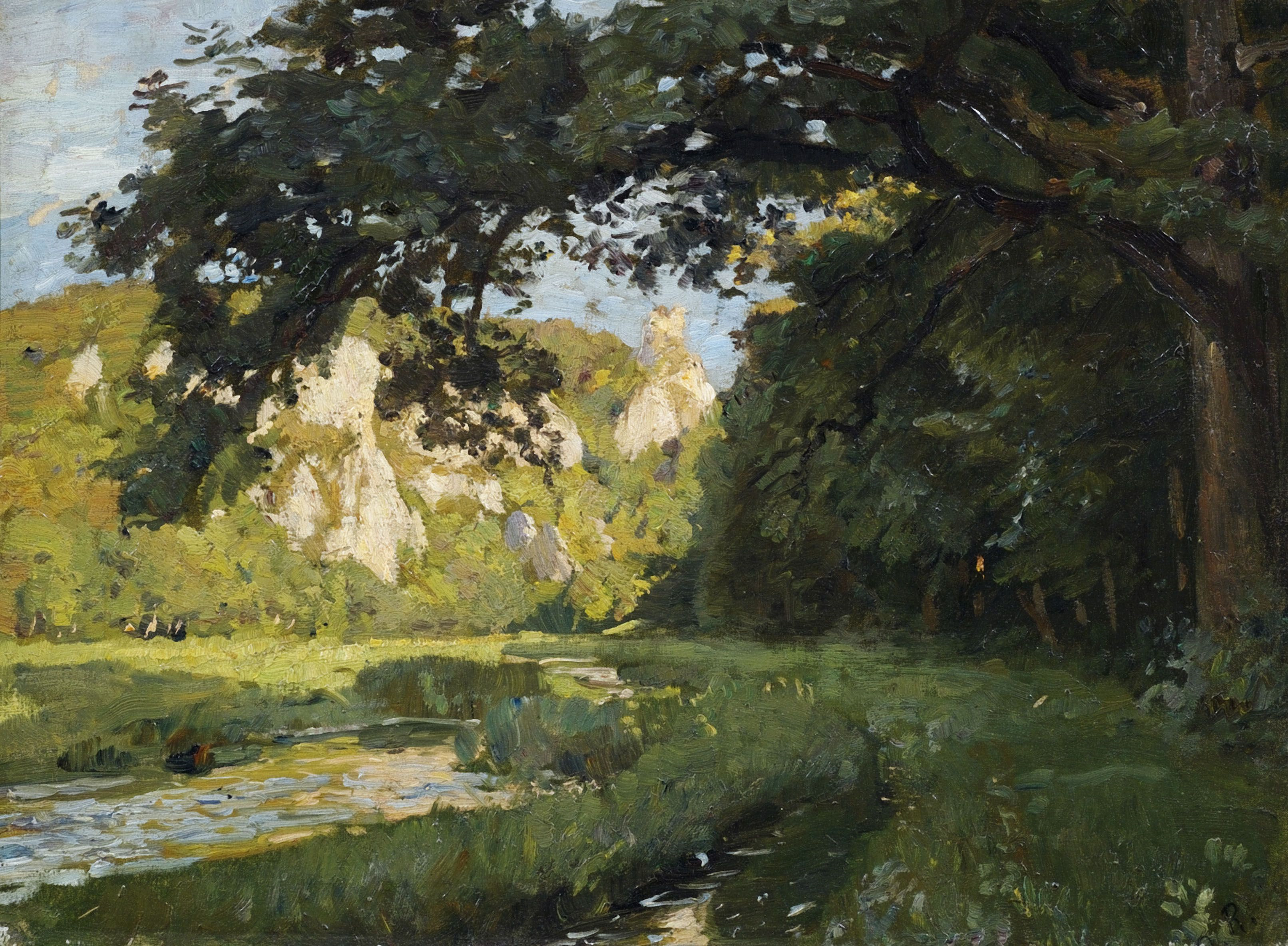 Sommerliche Landschaft, wohl bei Buttenhausen. Öl auf Leinwand, unten rechts monogrammiert. 42 x 55 cm. Provenienz: Sammlung Gert Nagel.